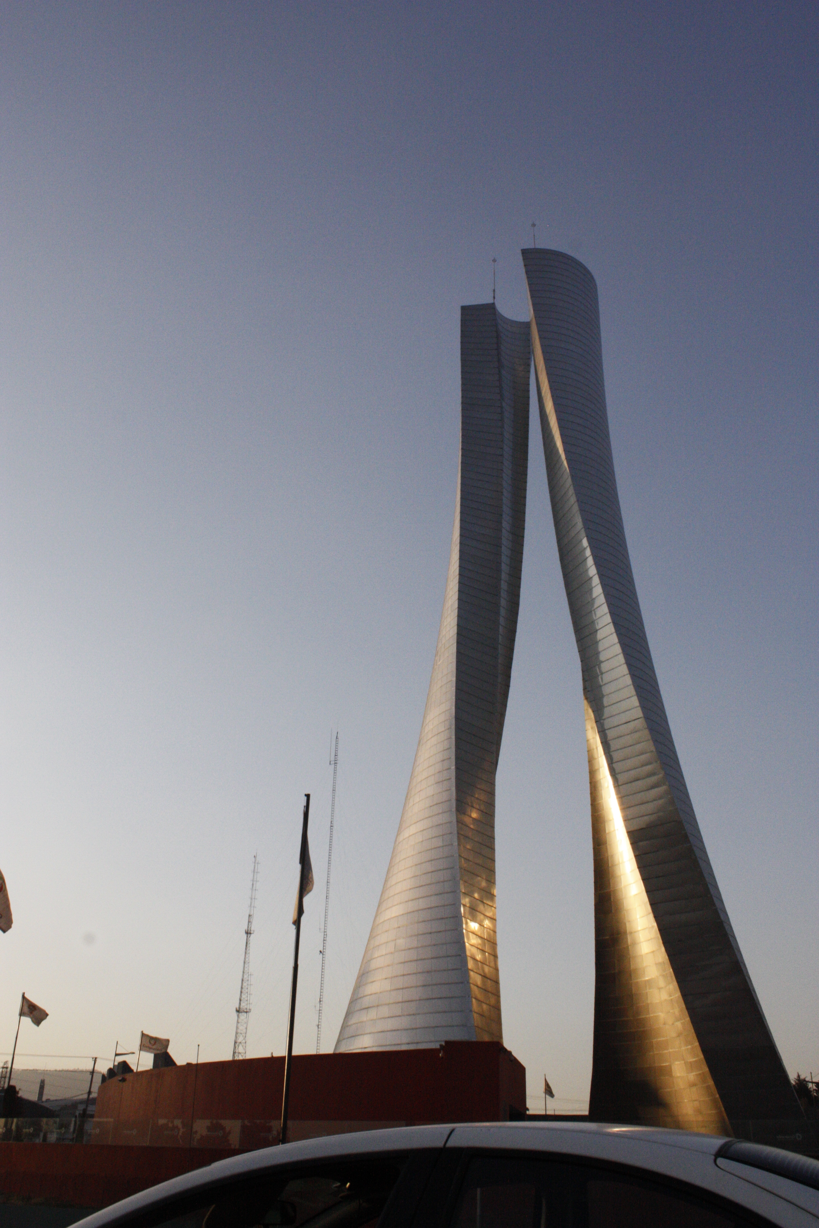 Torres Bicentenario, Toluca de Lerdo, Estado de México, México.